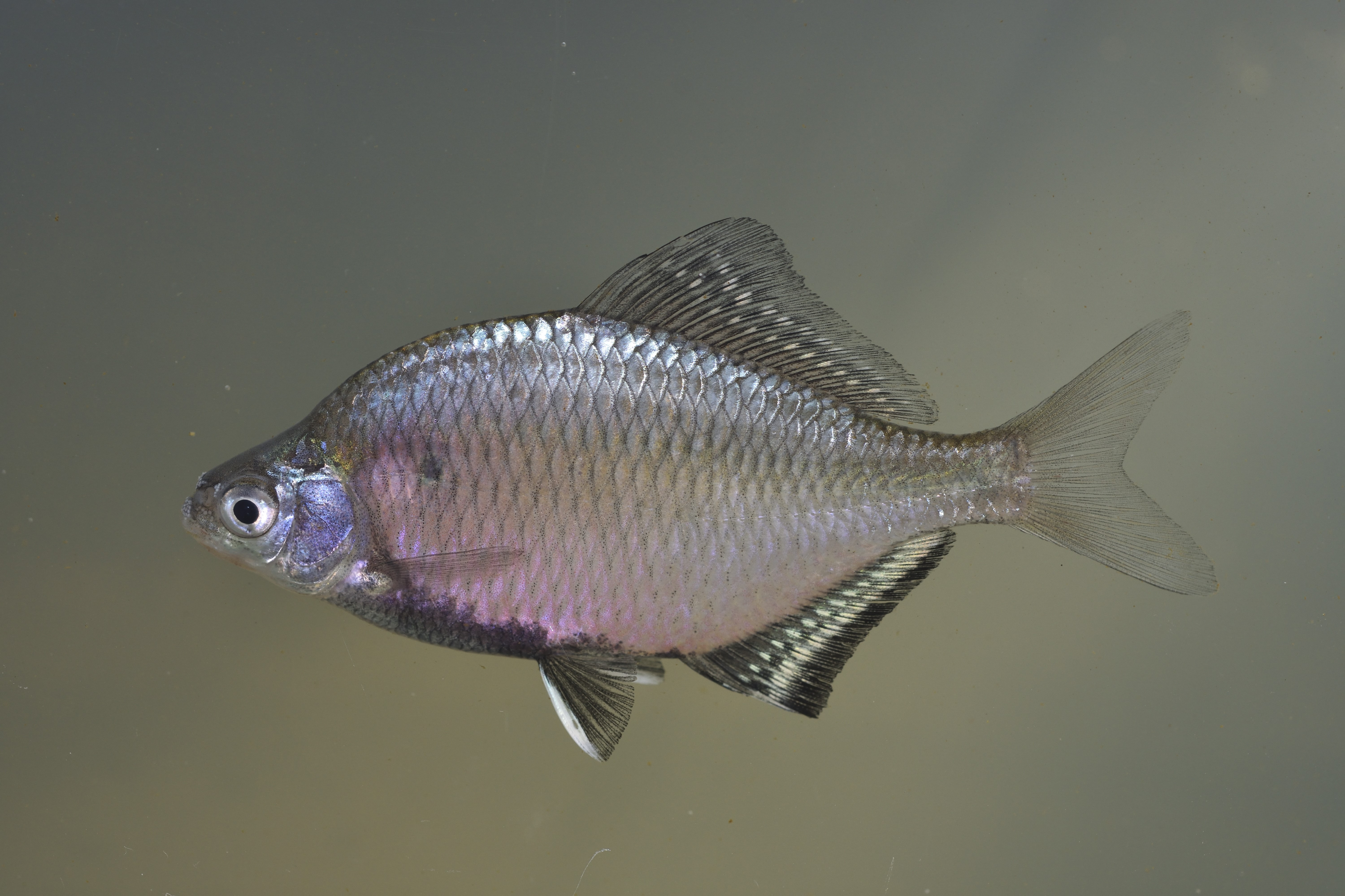 秋、婚姻色を呈するイタセンパラのオス（愛知県）。許可下の調査野生個体。詳細